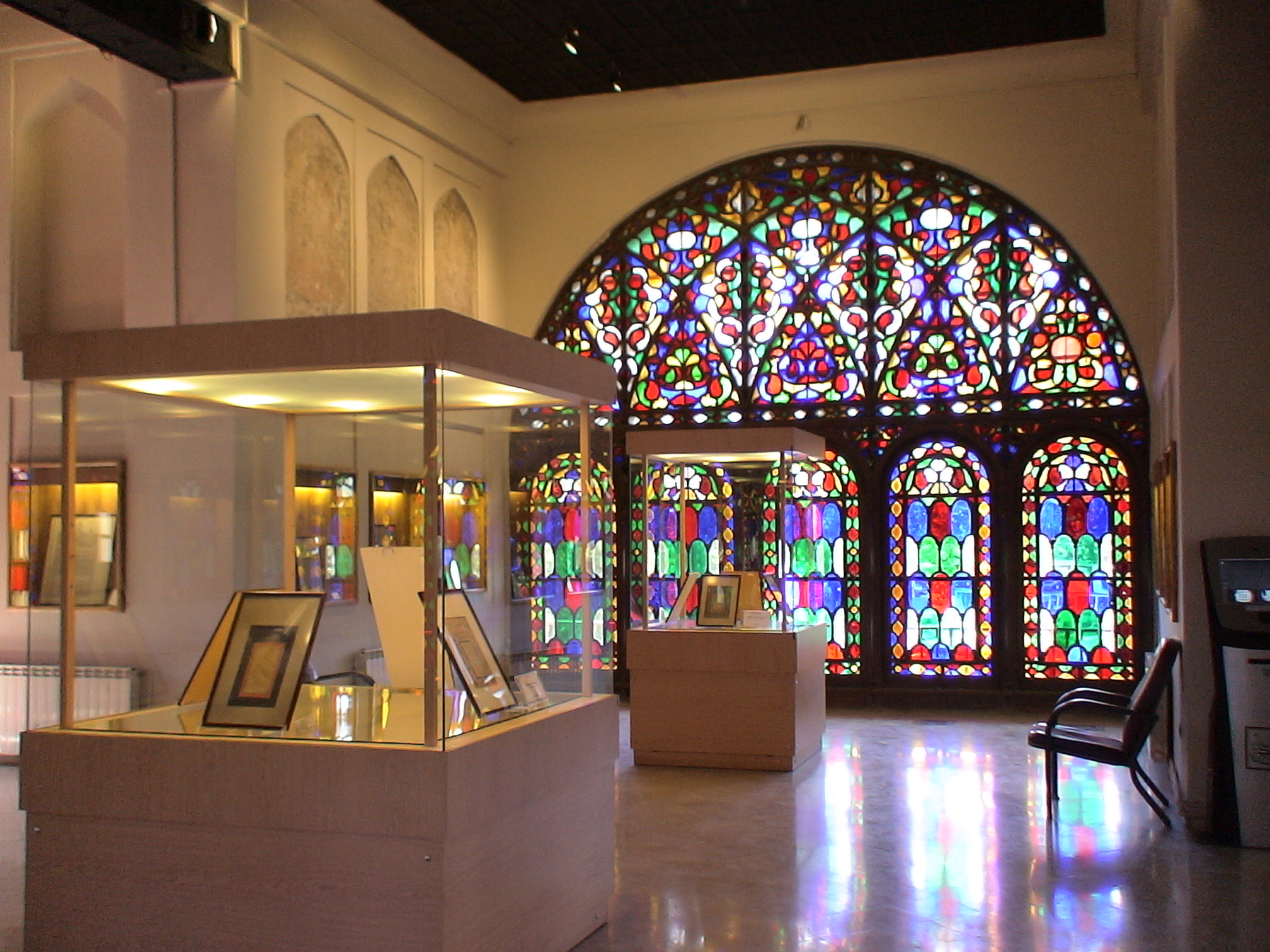 چهل‌ستون